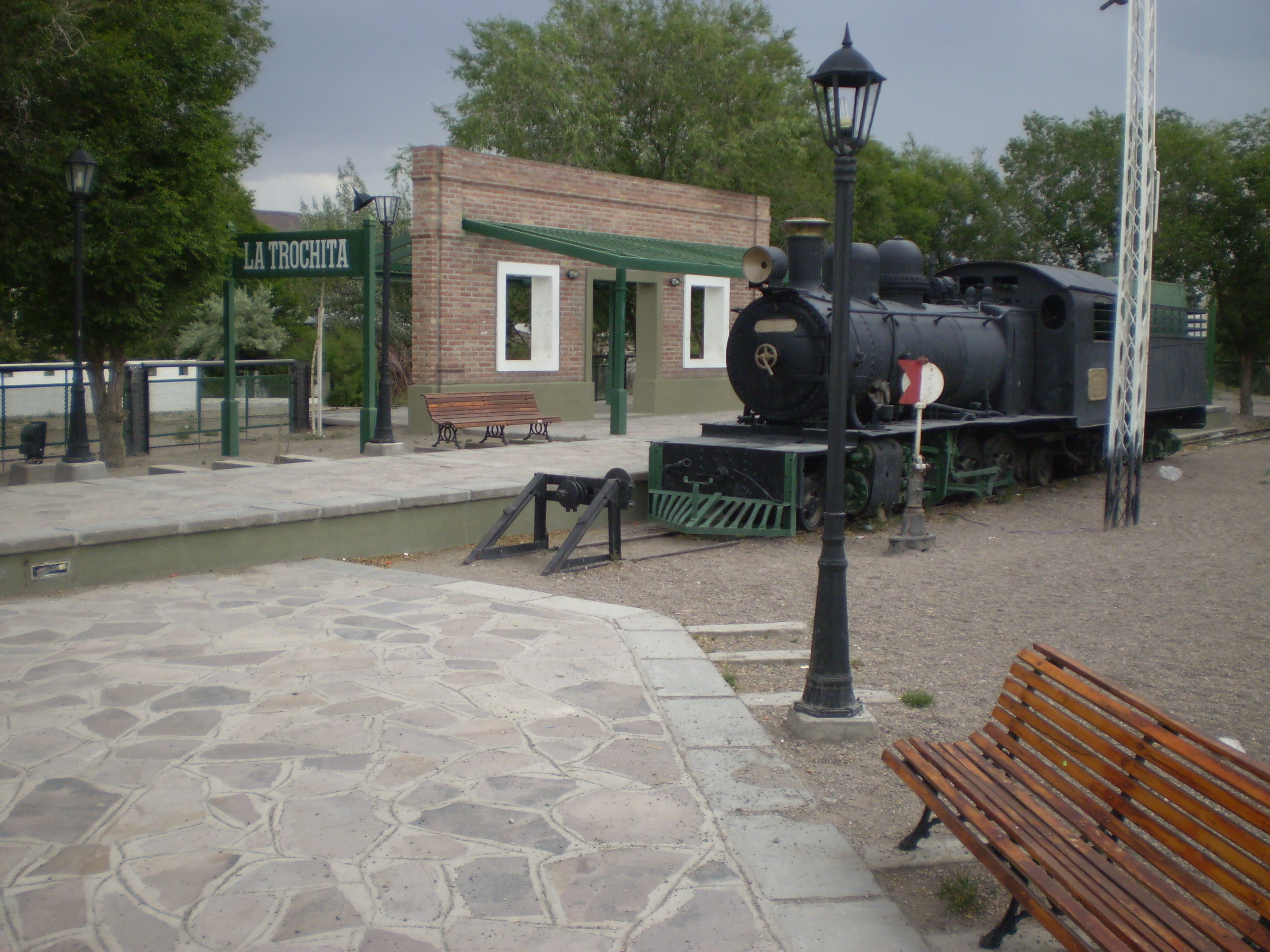 Estación del ferrocarril de Ingeniero Jacobacci, Rio Negro, Argentina. Estacion en homenaje a "La Trochita".